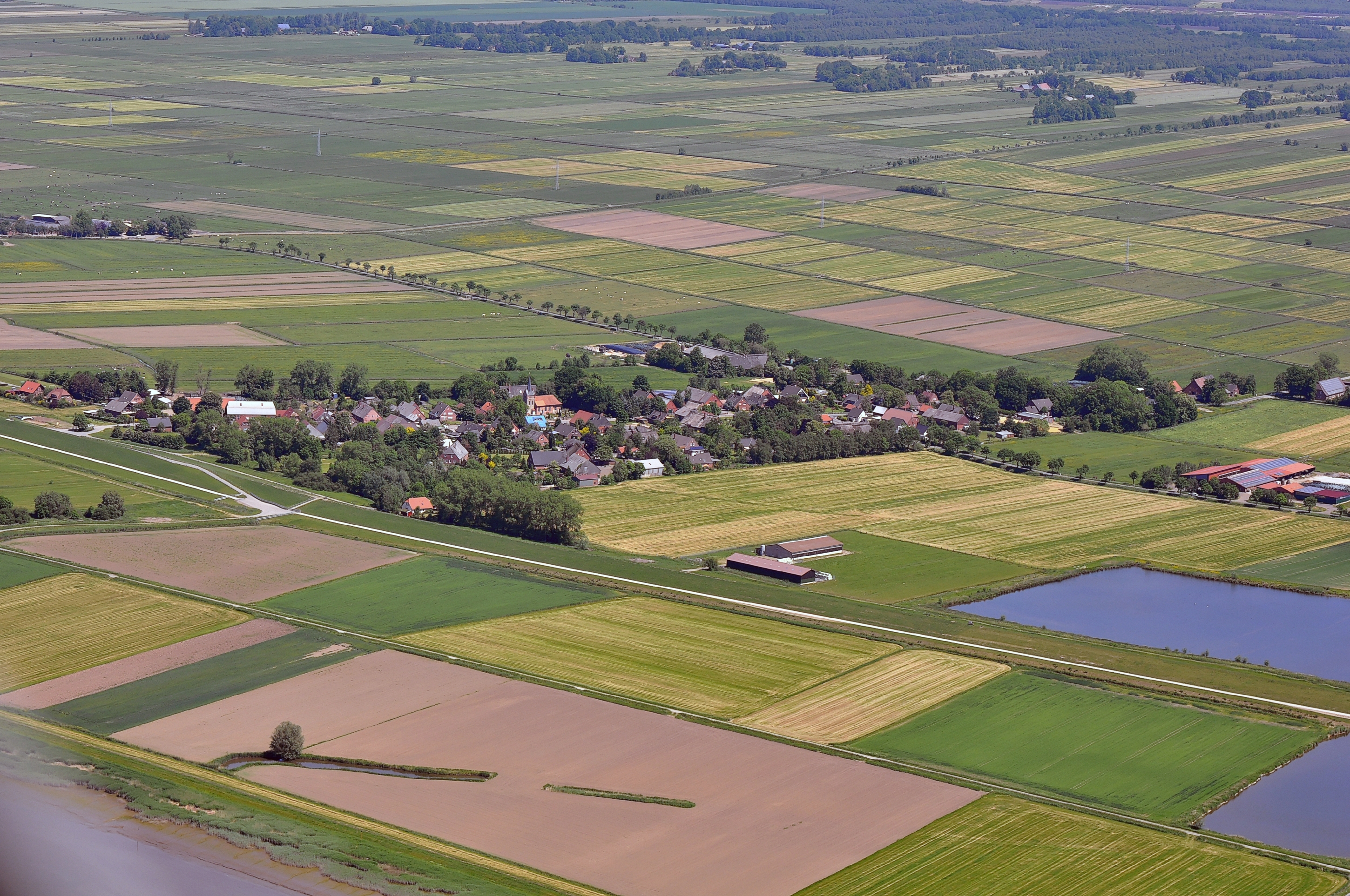 Wersabe. Luftbilder von der Nordseeküste 2012-05